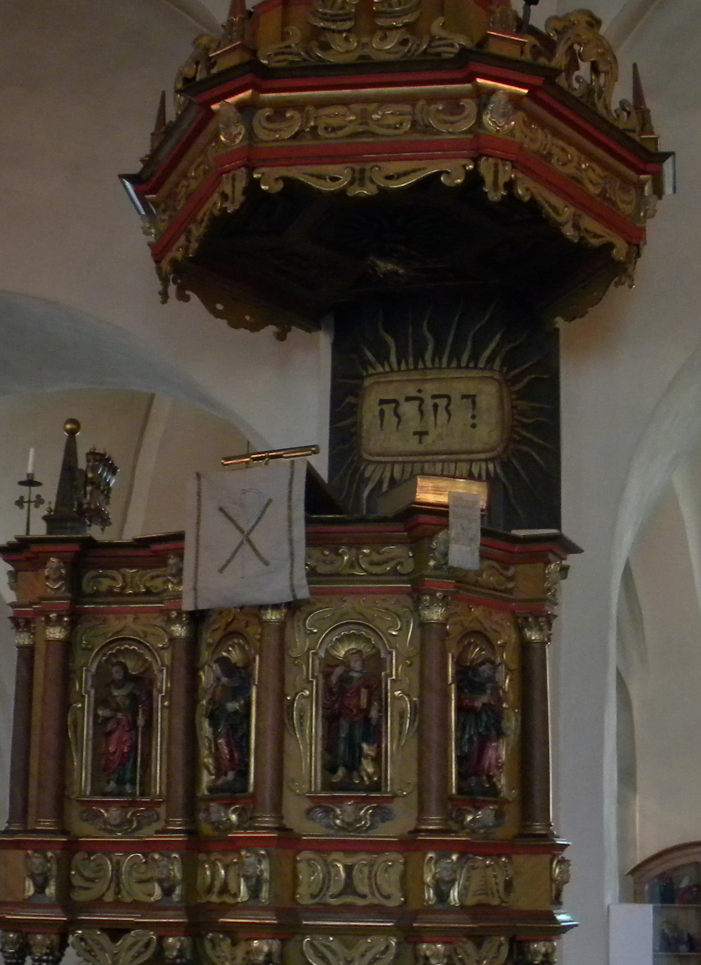 Predikstolen med tetragrammet JHWH i S:ta Ragnhilds kyrka, Södertälje